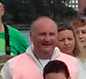 Ver título.